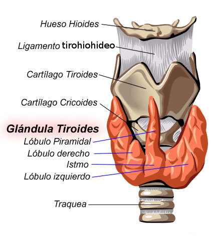 Tiroides anatomia